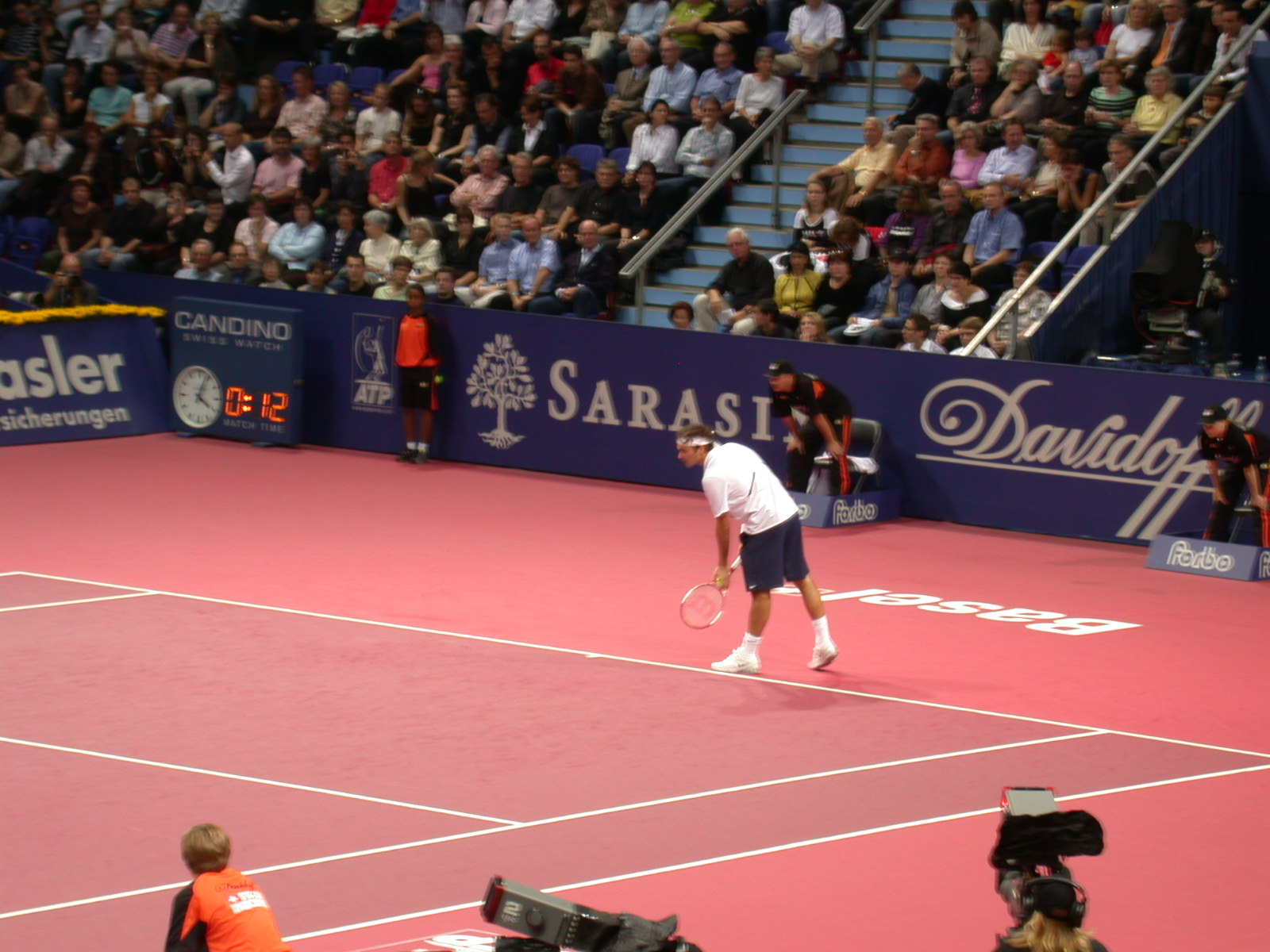 Roger Federer in Basel, Swiss Indoors 2006, semifinal against Paradorn Srichaphan